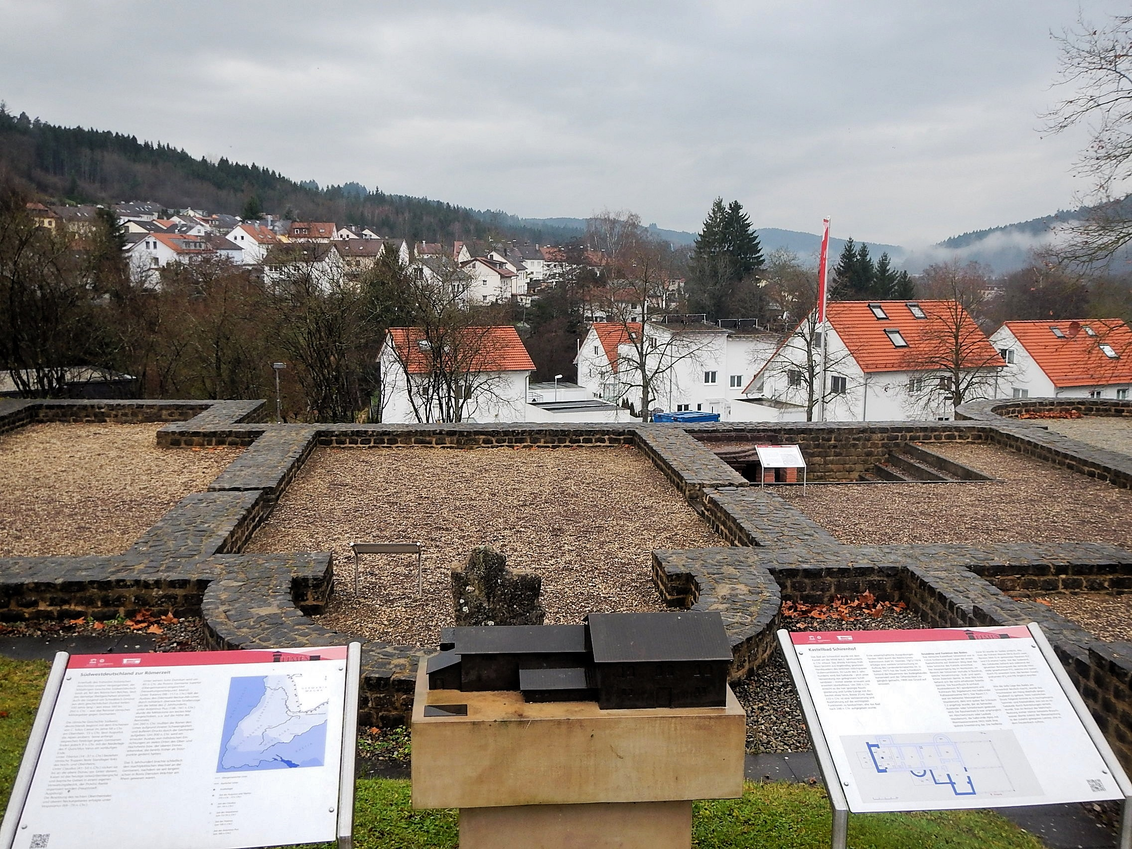 Kastellbad Schirenhof: Um ca. 150 n. Chr. errichtet, mit Blick zum Rätischen Limes